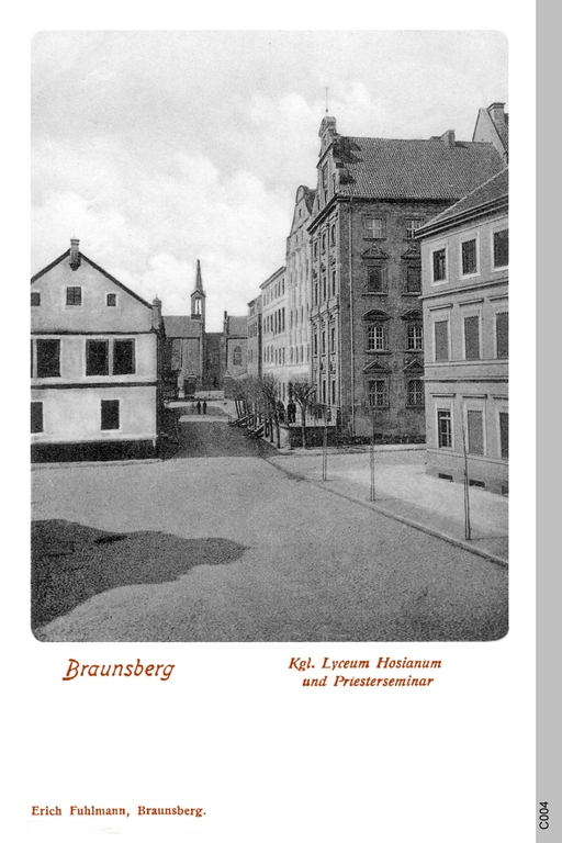 Lyceum Hosianum und Priesterseminar in Braunsberg, Ostpreußen